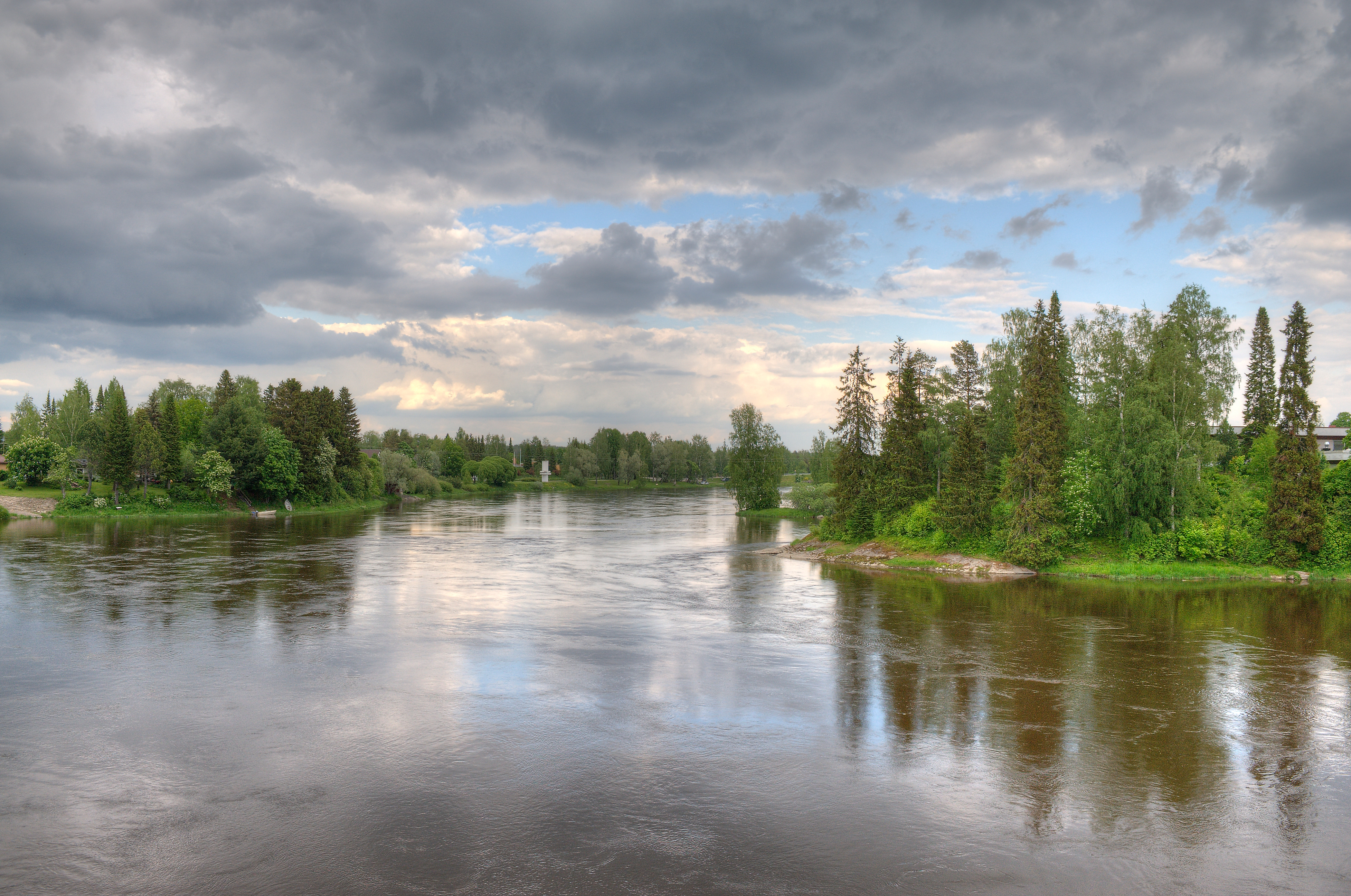 Kuva Kokemäen uudelta sillalta Kokemäenjoelle ylävirtaan. Taustalla Koskenperkaaja-patsas.